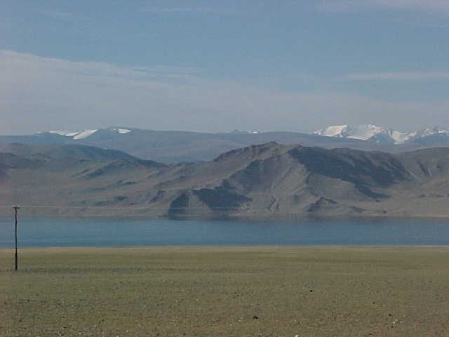 Lake Tolbo in Bayan-Ölgii aimag, Mongolia